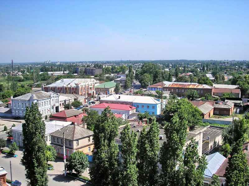 Бутурлиновка, центр города